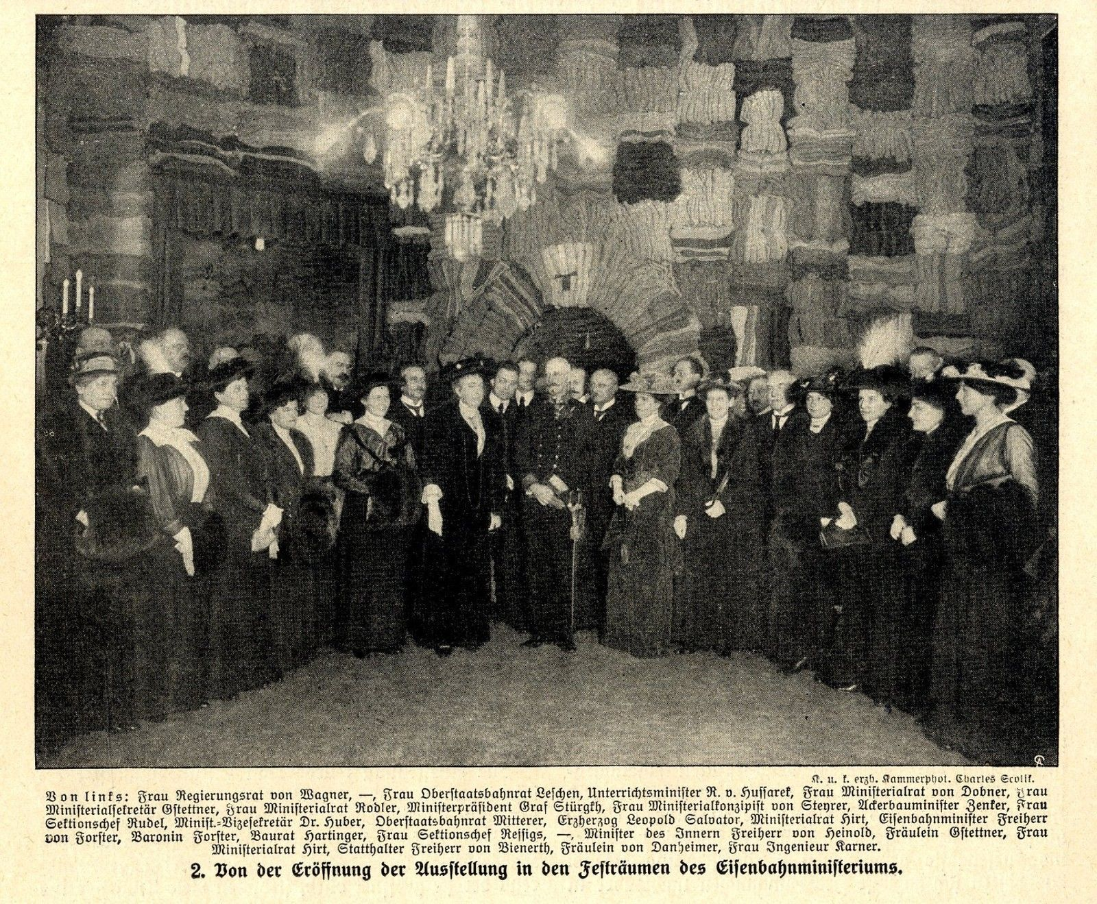 Gruppenbild im k.k. Eisenbahnministerum in Wien, 1914